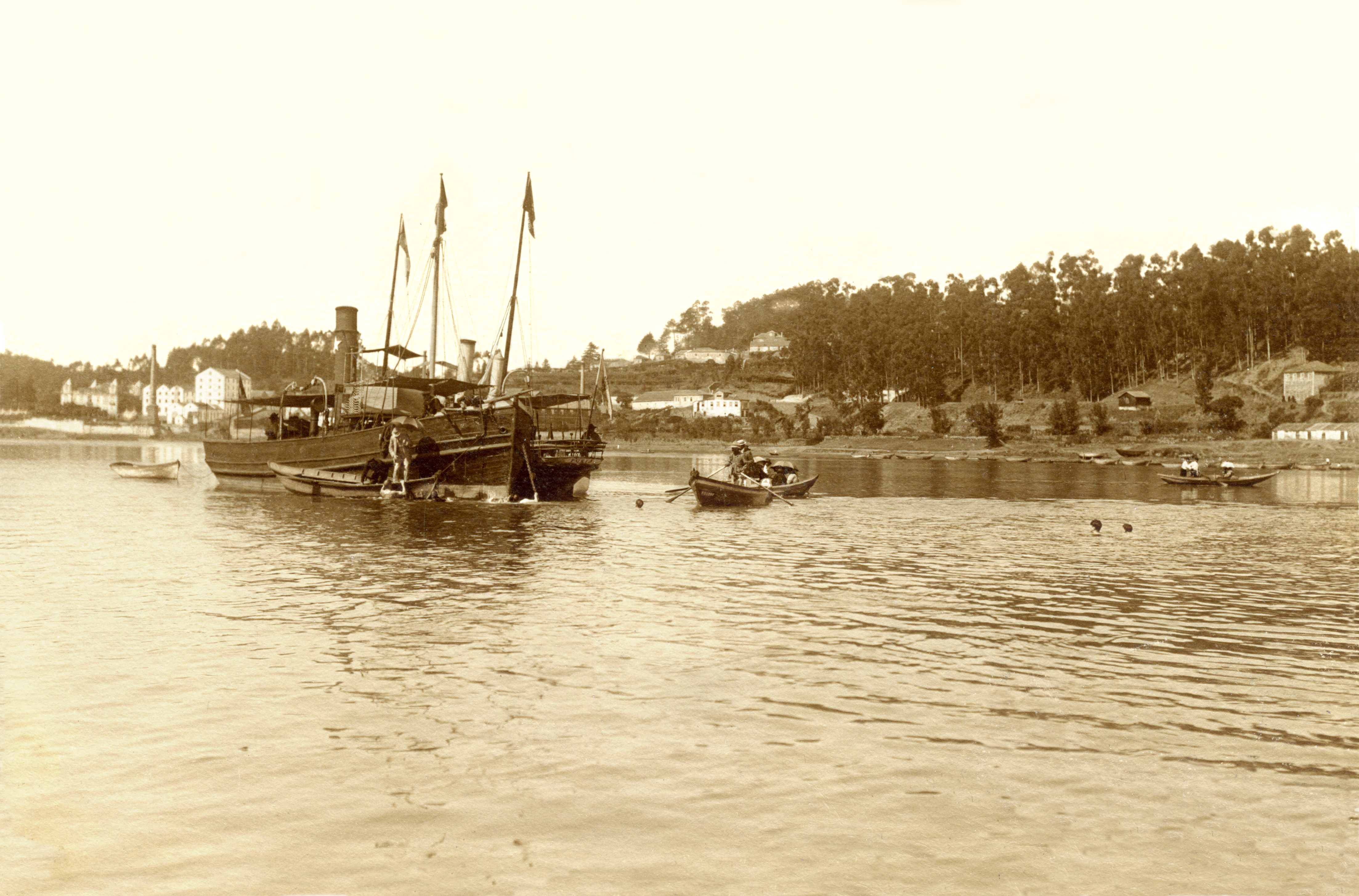 Vue de Valbom, Gondomar, sur le fleuve Douro. A l'extreme gauche on aperçoit le palais du Freixo (Porto). Sur le fleuve on voit les valboeiros" (petits bateaux typiques de l'endroit) des pêcheurs qui mouillent près de la berge de ce quartier appelé "Ribeira d'Abade". D'autres valboeiros et deux bateaux à vapeur promènent des touristes. Dans l'eau plusieurs nageurs du coin s'approchent de ces bateaux.